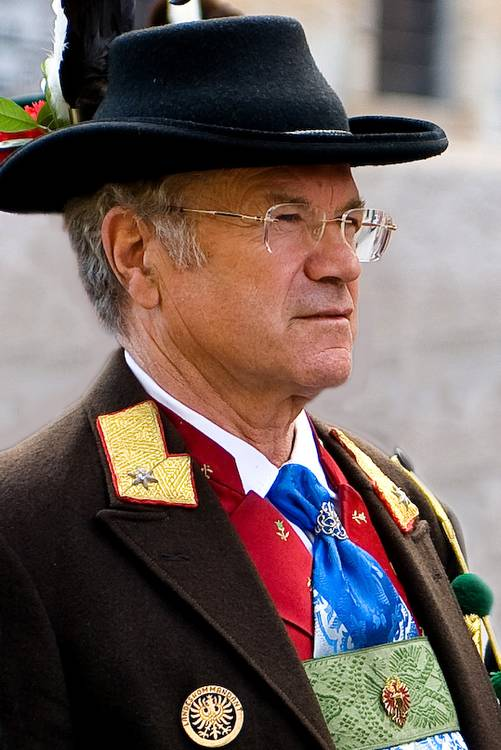 Paul Bacher - Landeskommandat der Südtiroler Schützen 2009